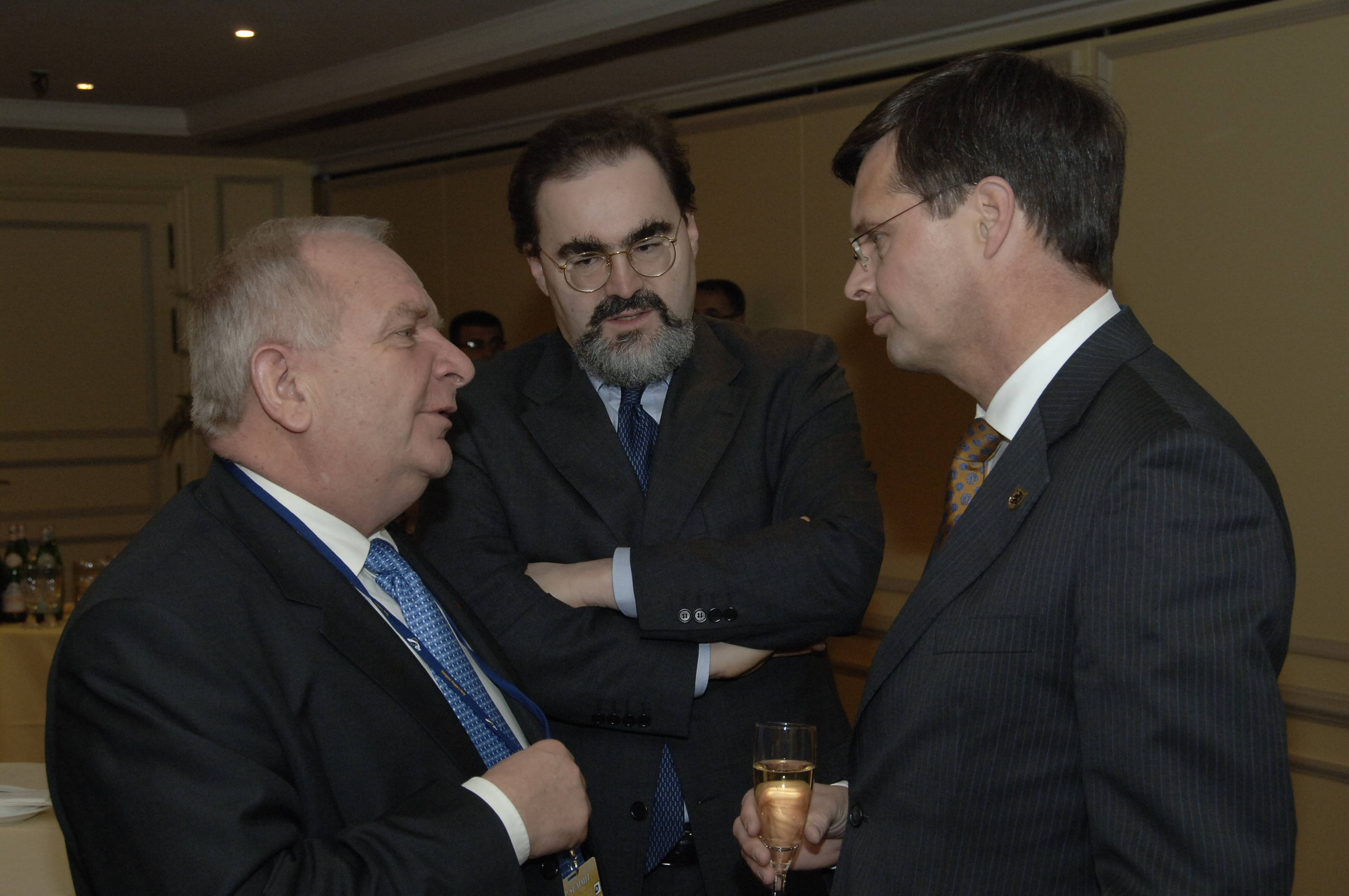 Daul-Balkenende5